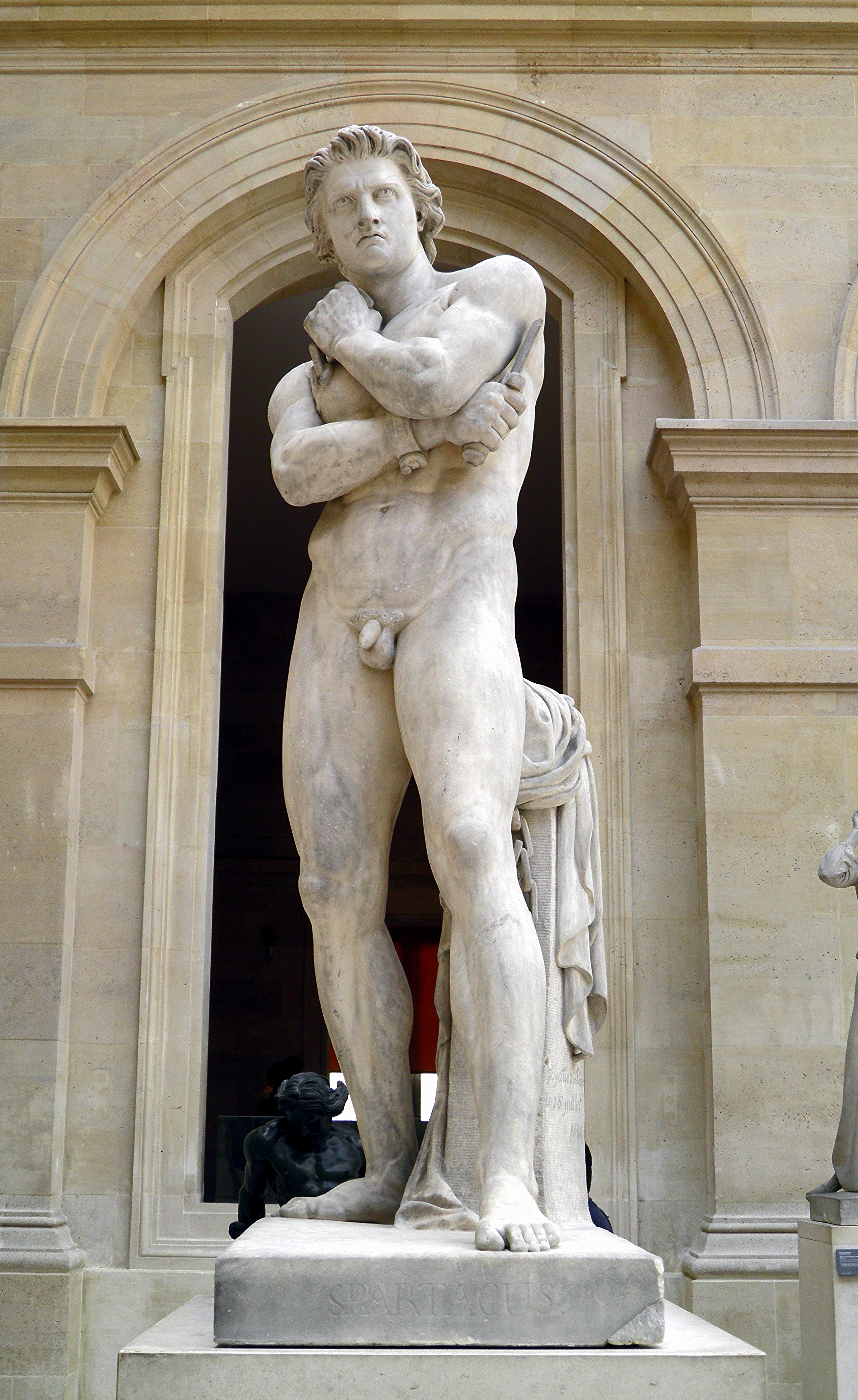 Spartacus, marble sculpture of Denis Foyatier (1830), Louvre Museum